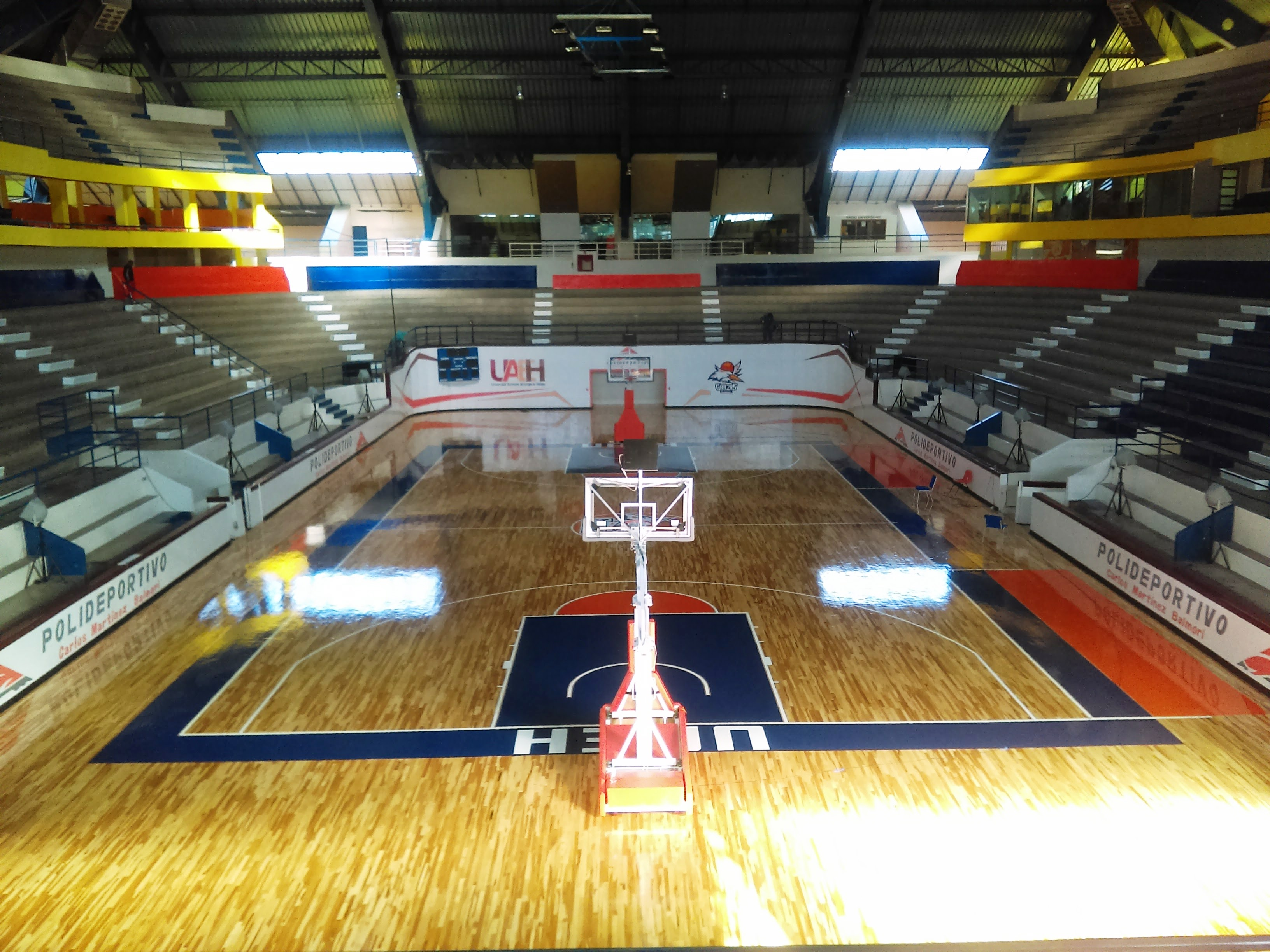 Polideportivo Universitario Carlos Martínez Balmori